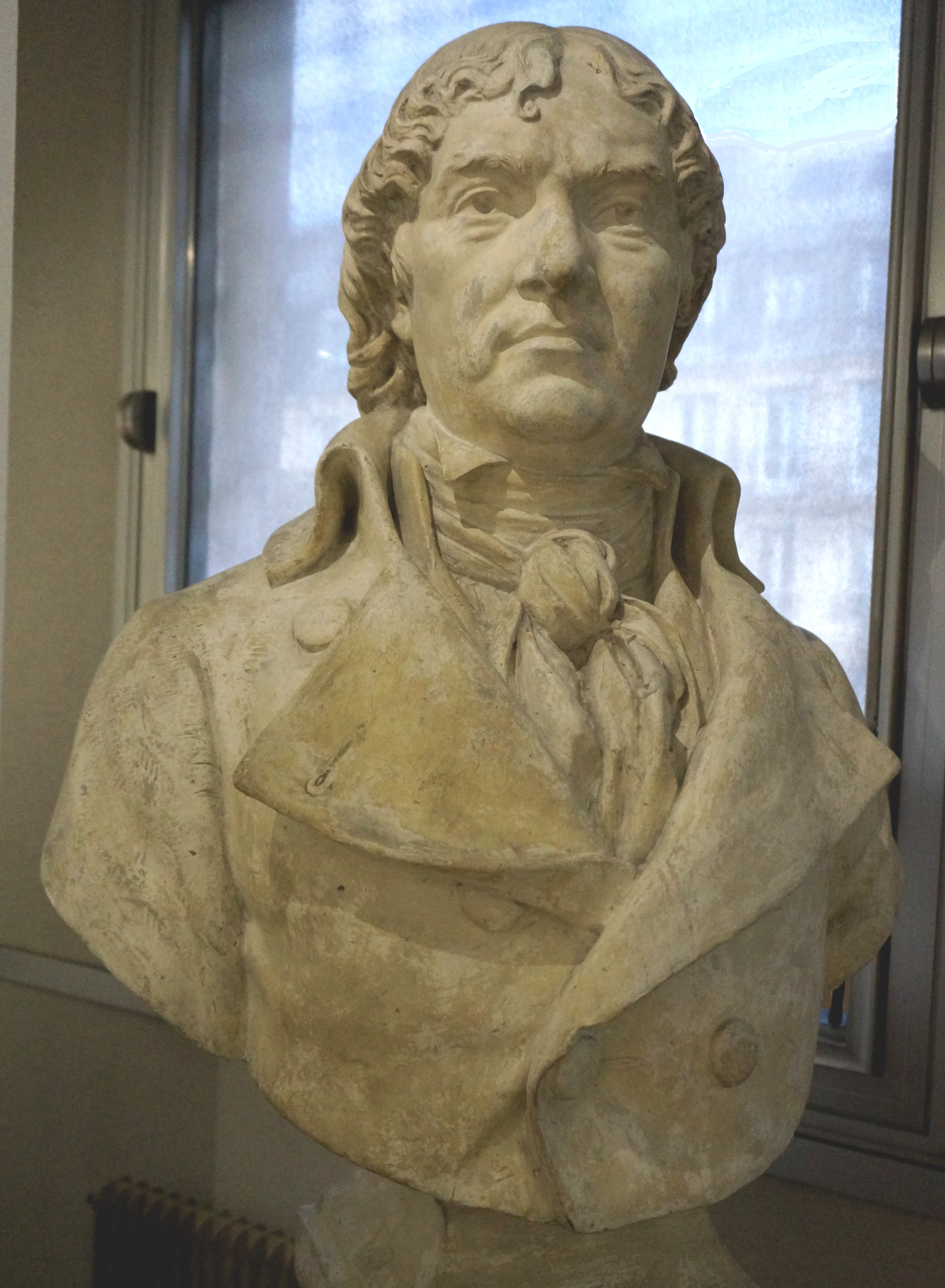 présenté au Musée de la Préfecture de Police (Paris).